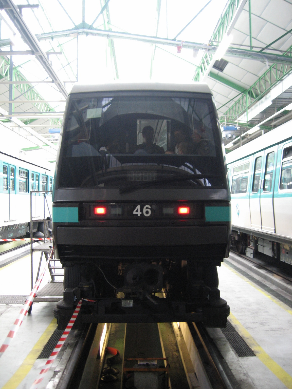 MP 89 en fosse à l'Atelier de Maintenance des Trains / JPO Ateliers de Saint-Ouen 06/06/2009.